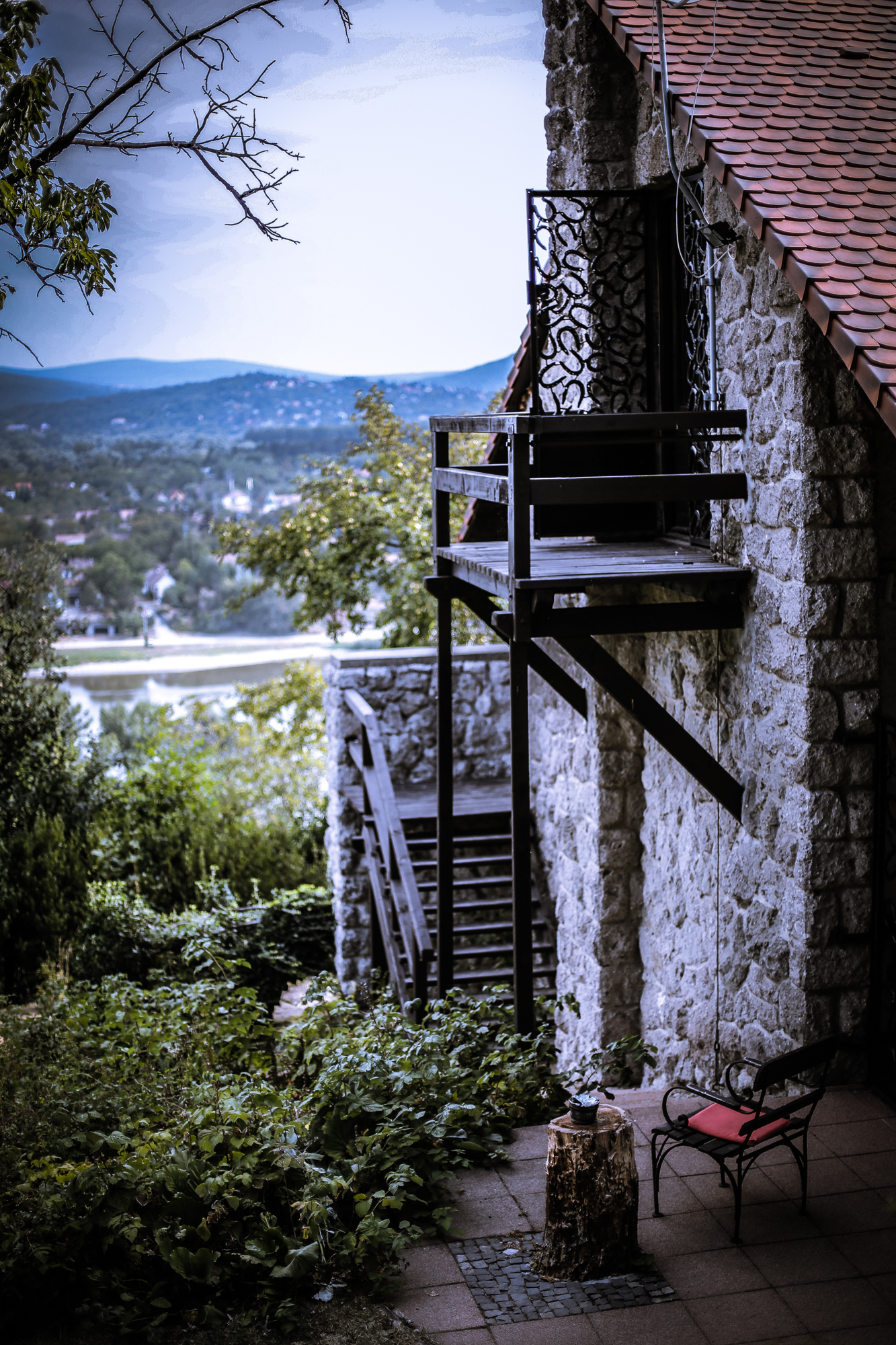 Patkó villa